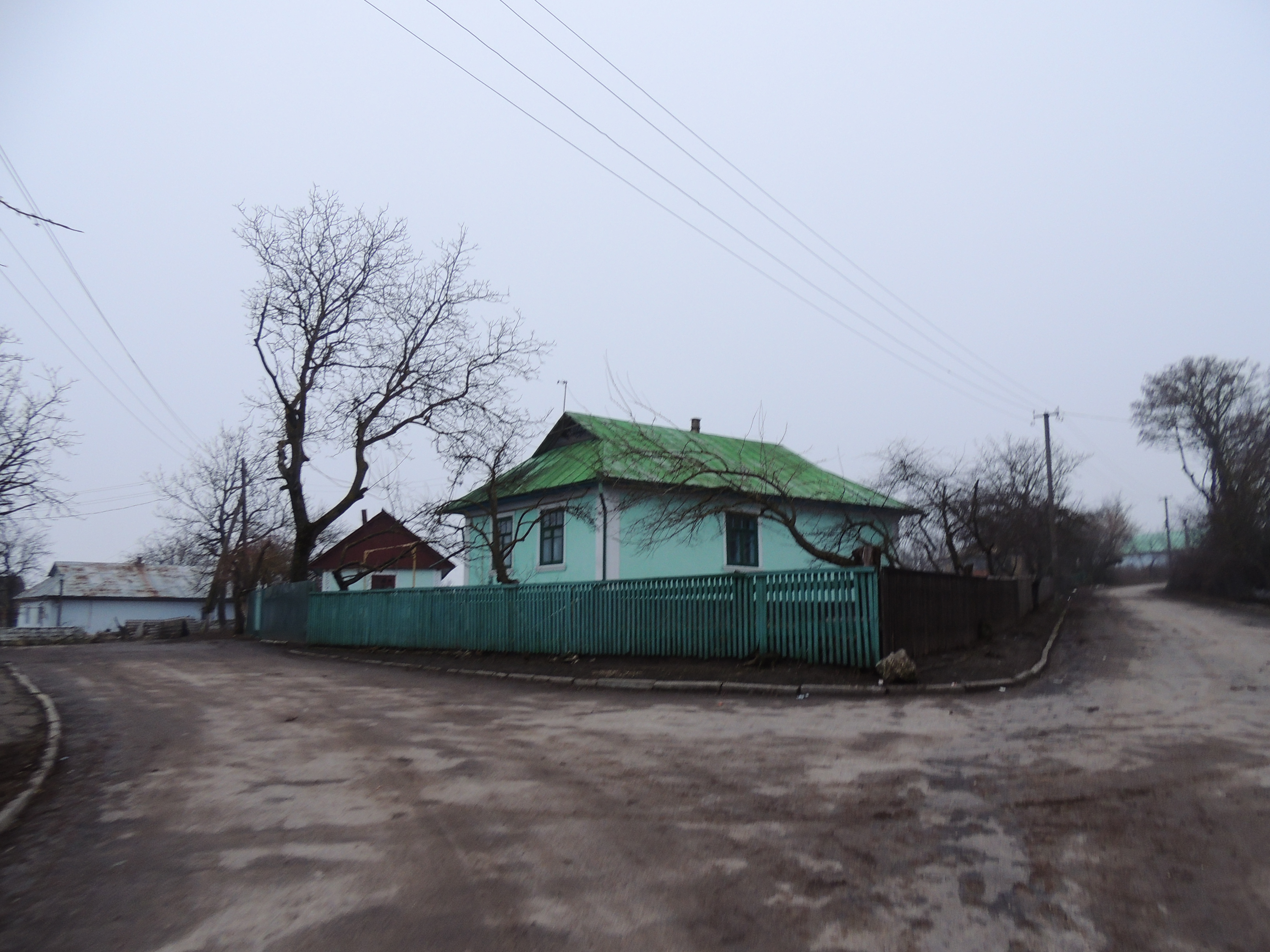 Це фото.